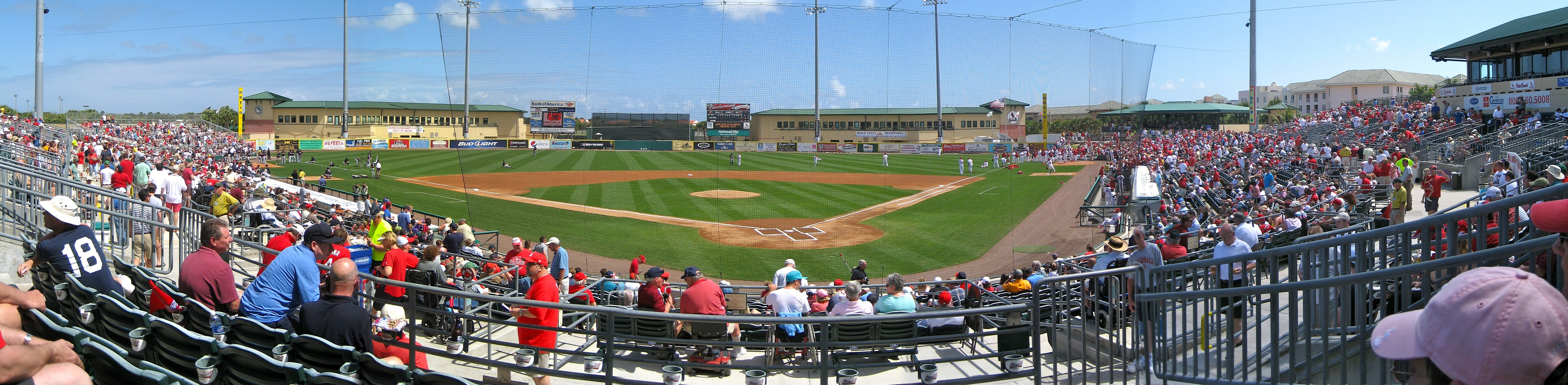 Roger Dean Stadium Panorama - Jupiter, Florida